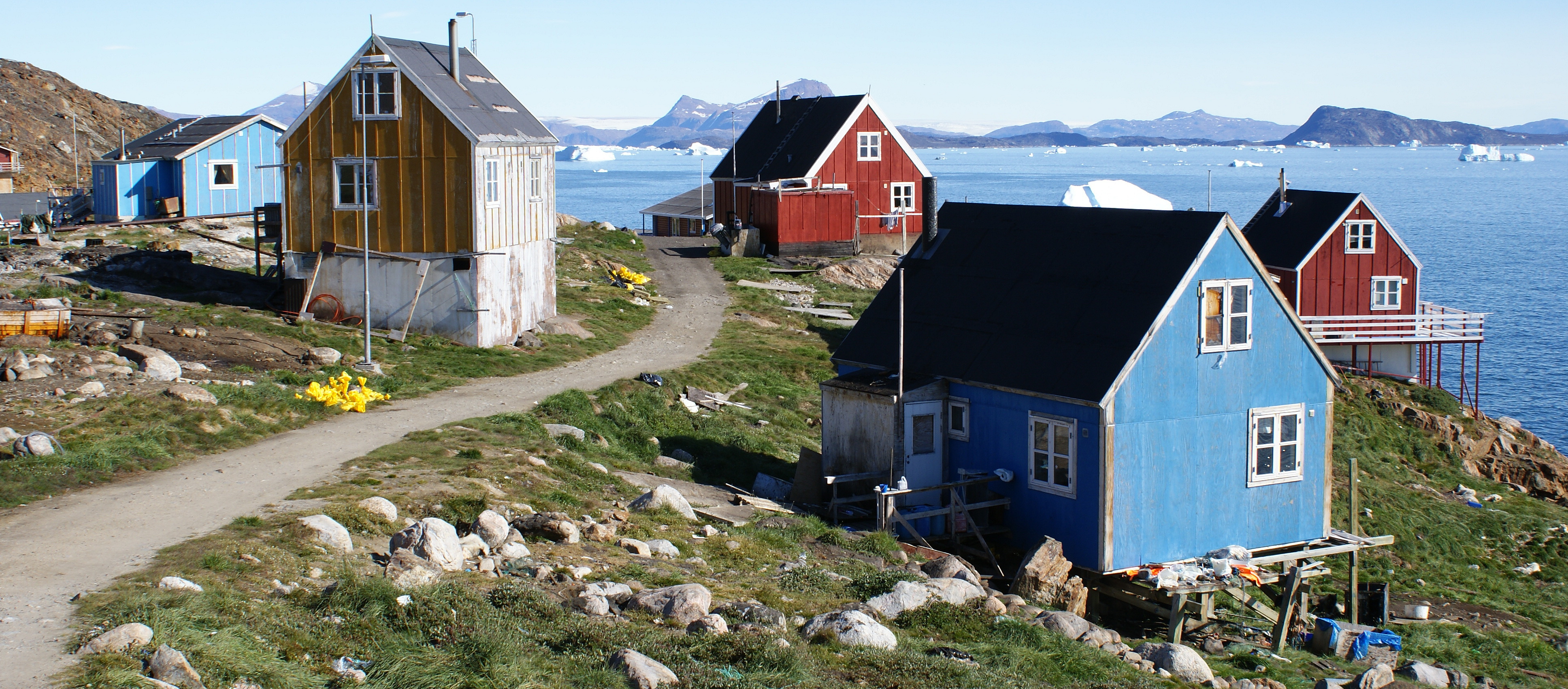 Nuussuaq, Upernavik Archipelago, Greenland.